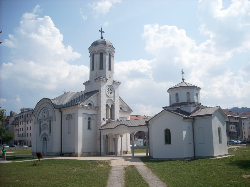 Црква успења Пресвете Богородице у Палама